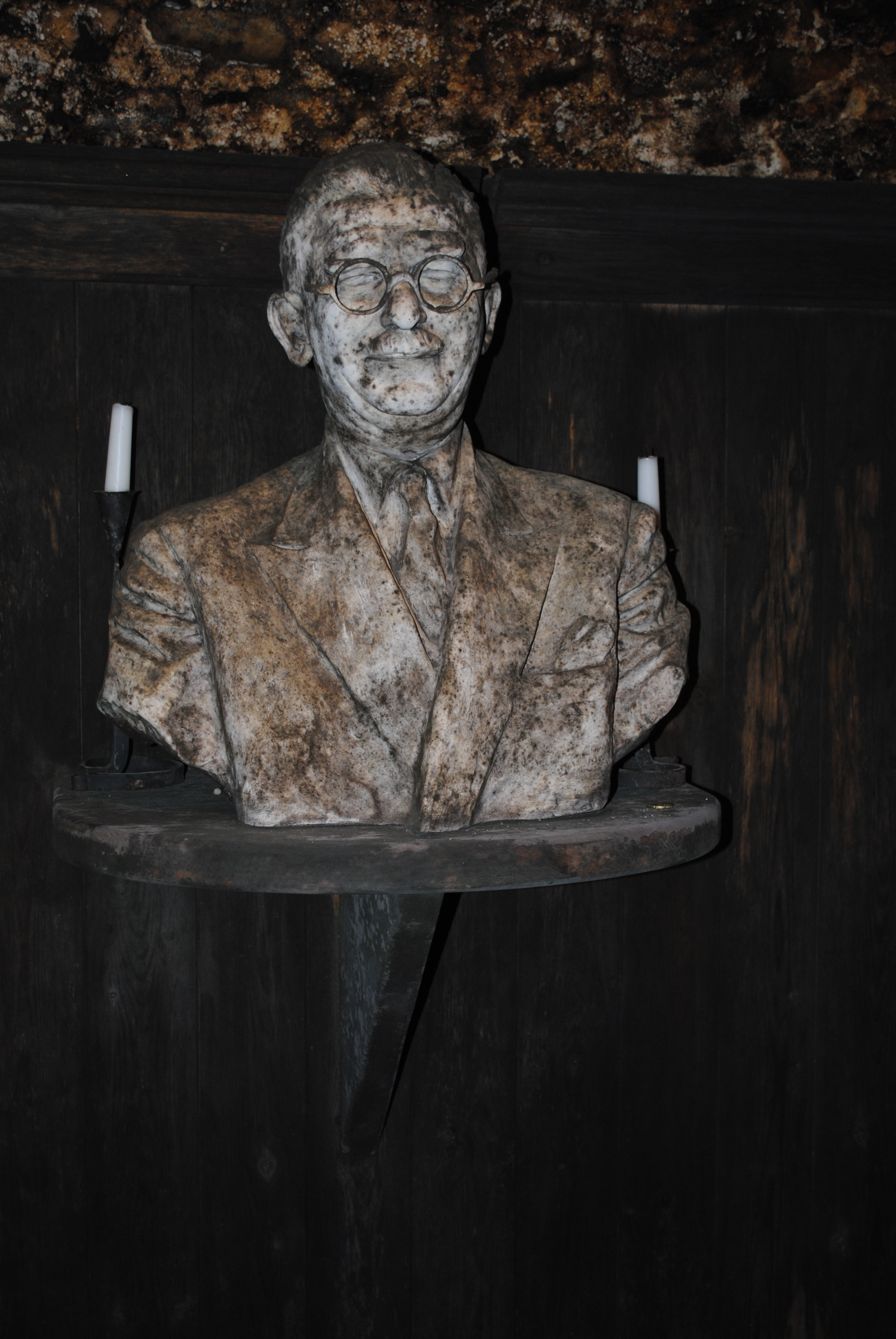 Büste von Leopold Figl im Keller der Domäne Wachau